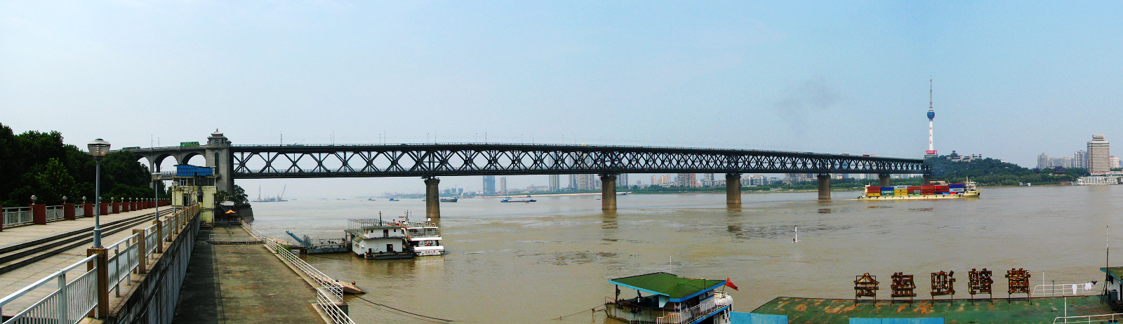 武汉长江大桥